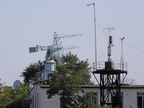 Массив спиральных антенн. Одна из первых систем сбора телеметрии. Евпатория.